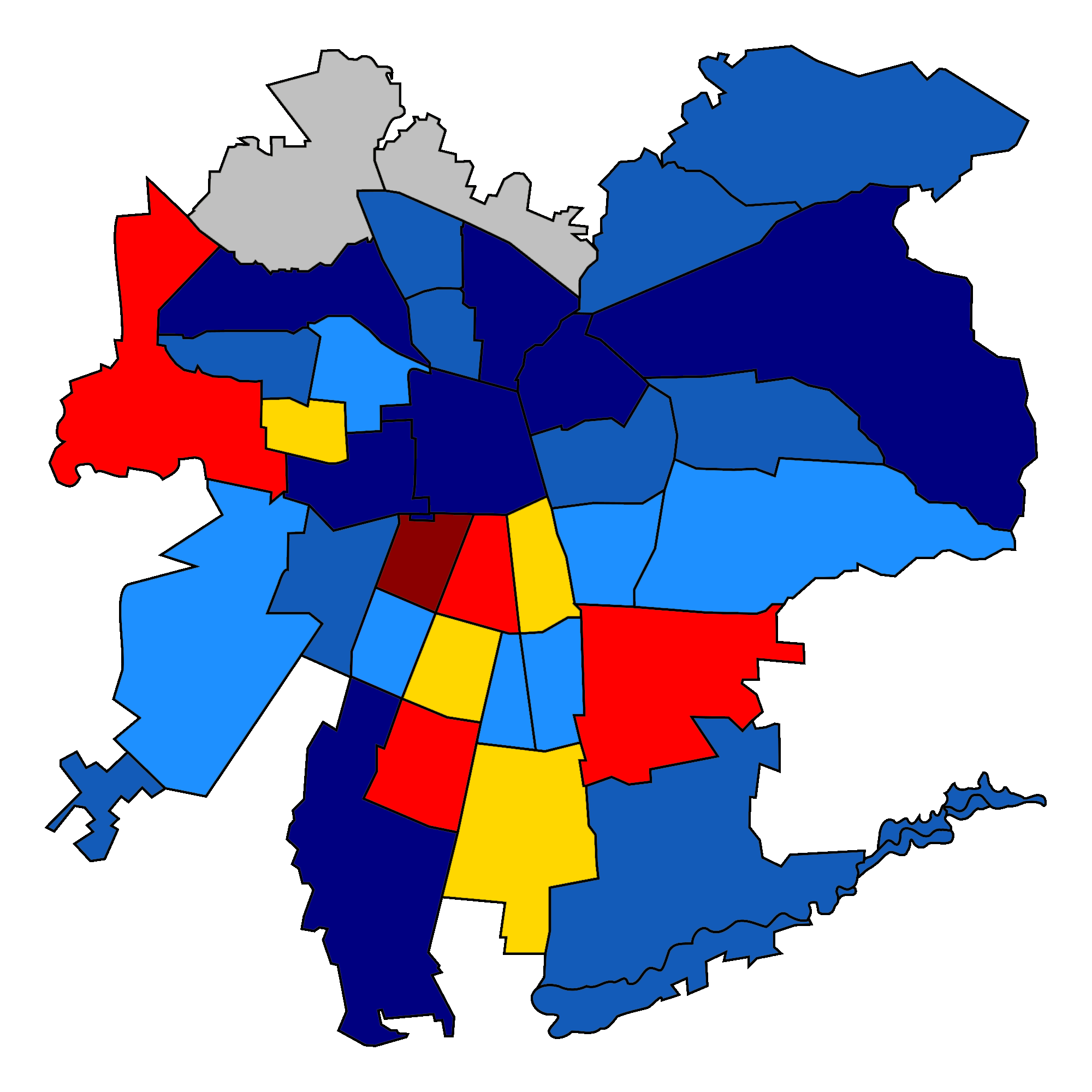 Resultado de las elecciones de alcaldes de 2012 en las comunas del Gran Santiago PCCh PS PPD PDC Independientes RN UDI